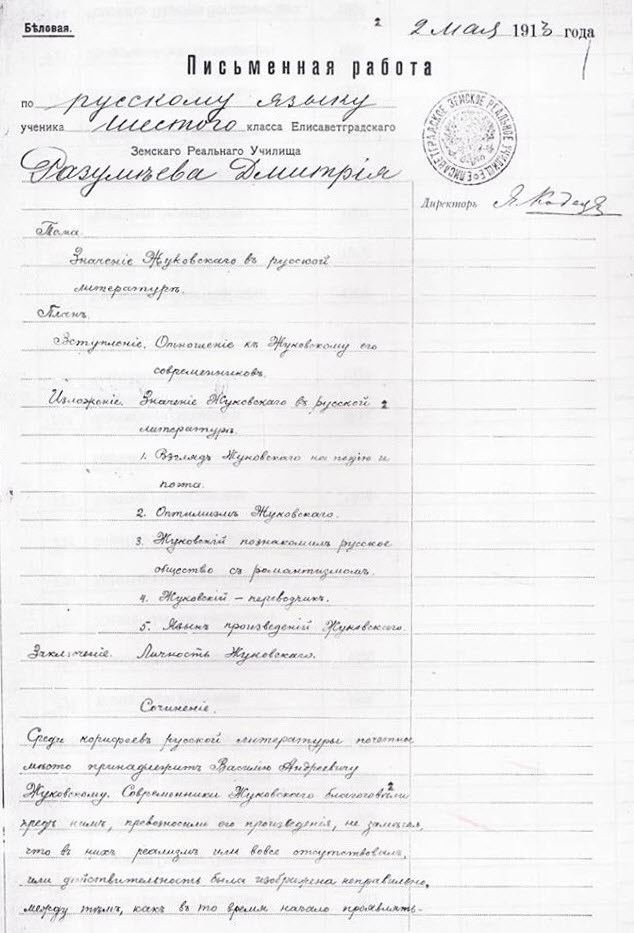 Письмова робота (твір) з російської мови учня 6 класу училища